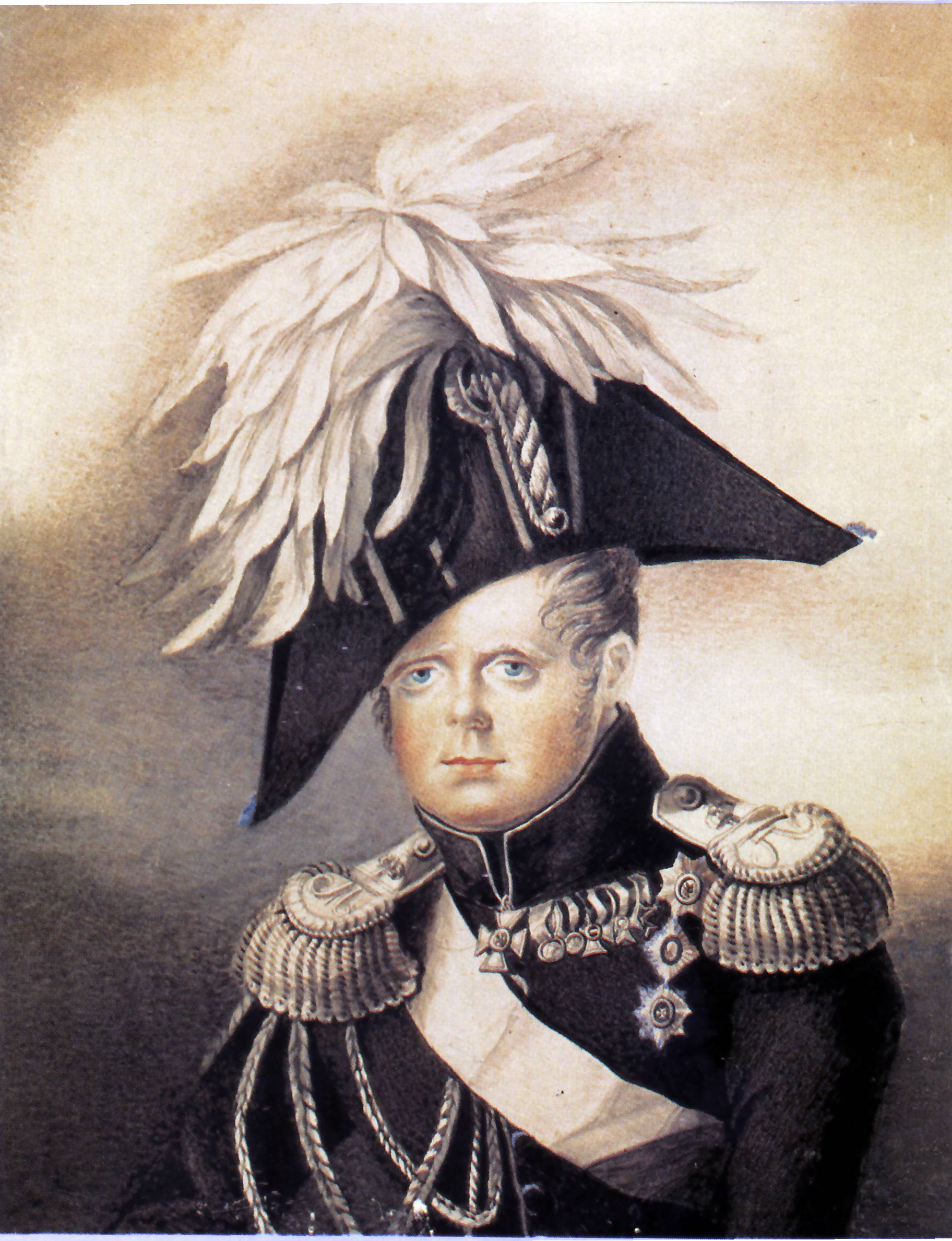 Портрет вел. кн. Константина Павловича. 1819. А.Г. Рокштуль. ГМП